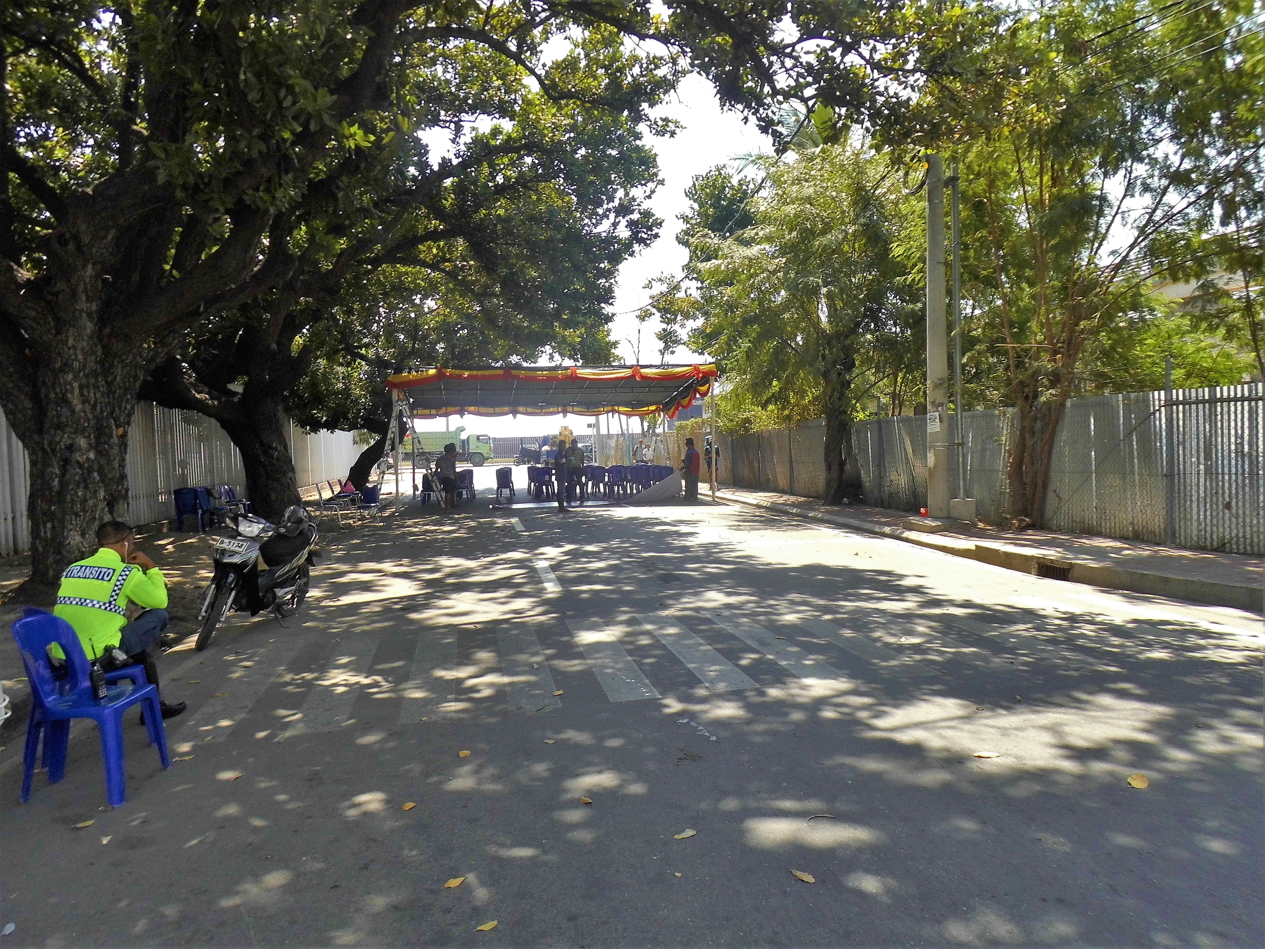 Rua de Mocambique